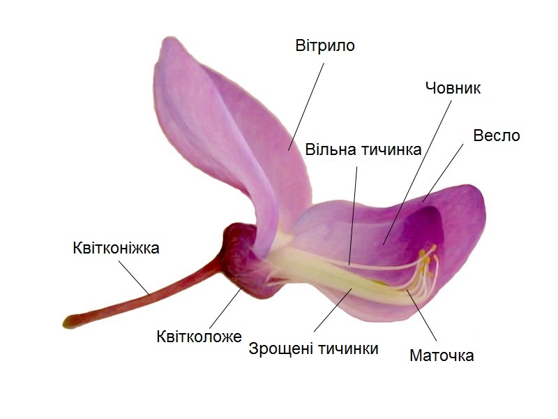 Будова квітки типових рослин родини бобових на прикладі Wisteriae sinensis